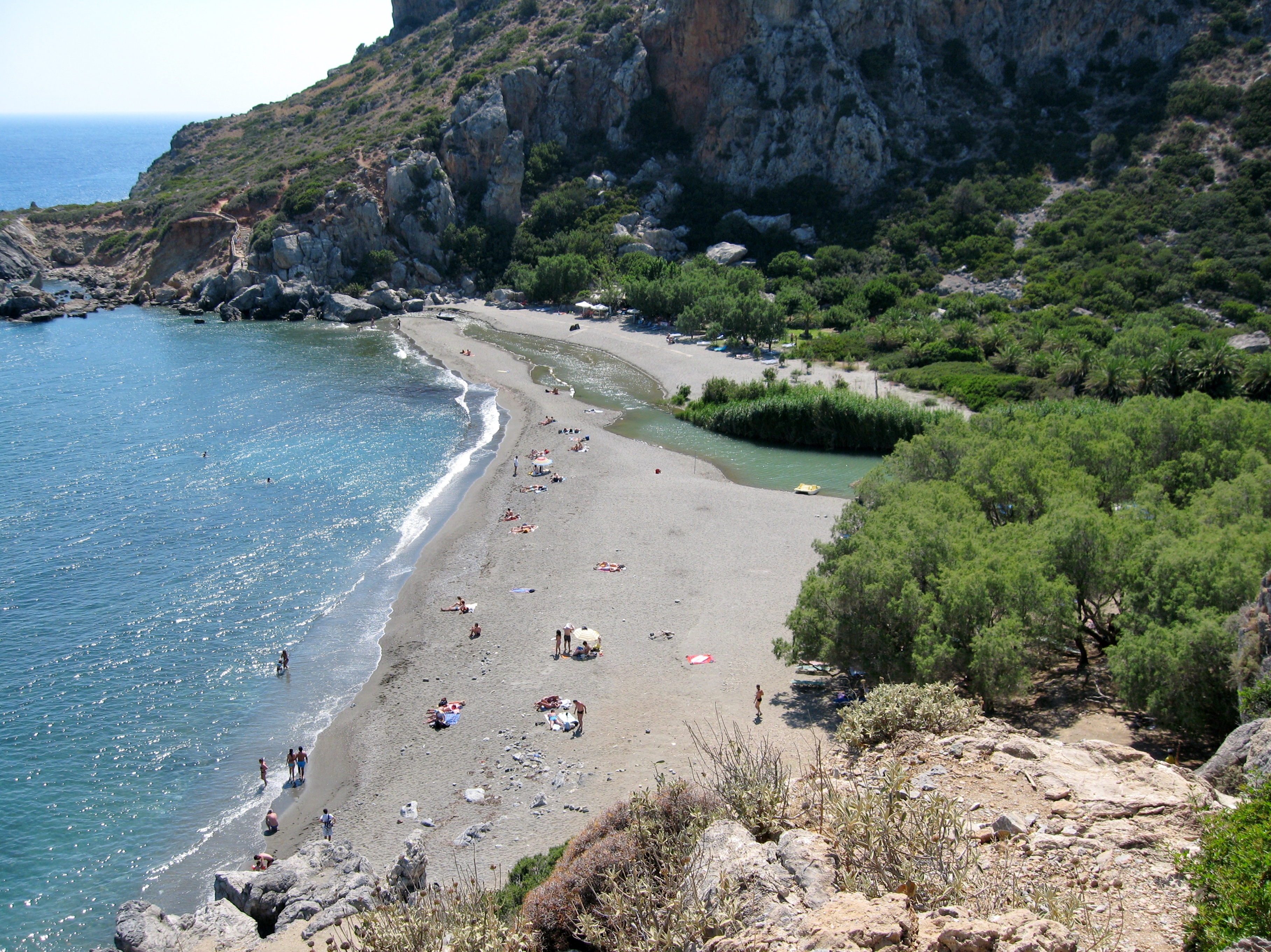 Palmenstrand von Preveli an der Mündung des Megalopotamos, Gemeinde Agios Vasilios, Regionalbezirk Rethymno, Kreta, Griechenland